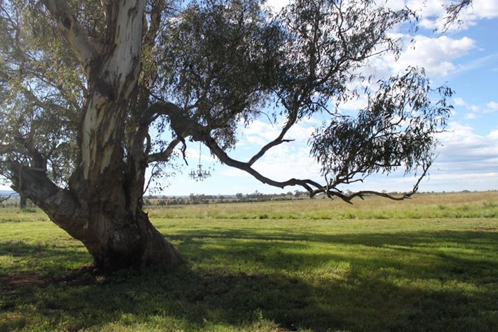 Buckinbah Station in spring